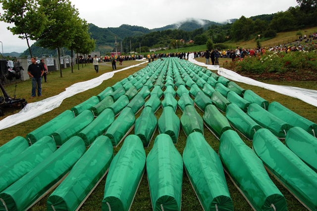 Srebrenica-Potočari 11 July 2007